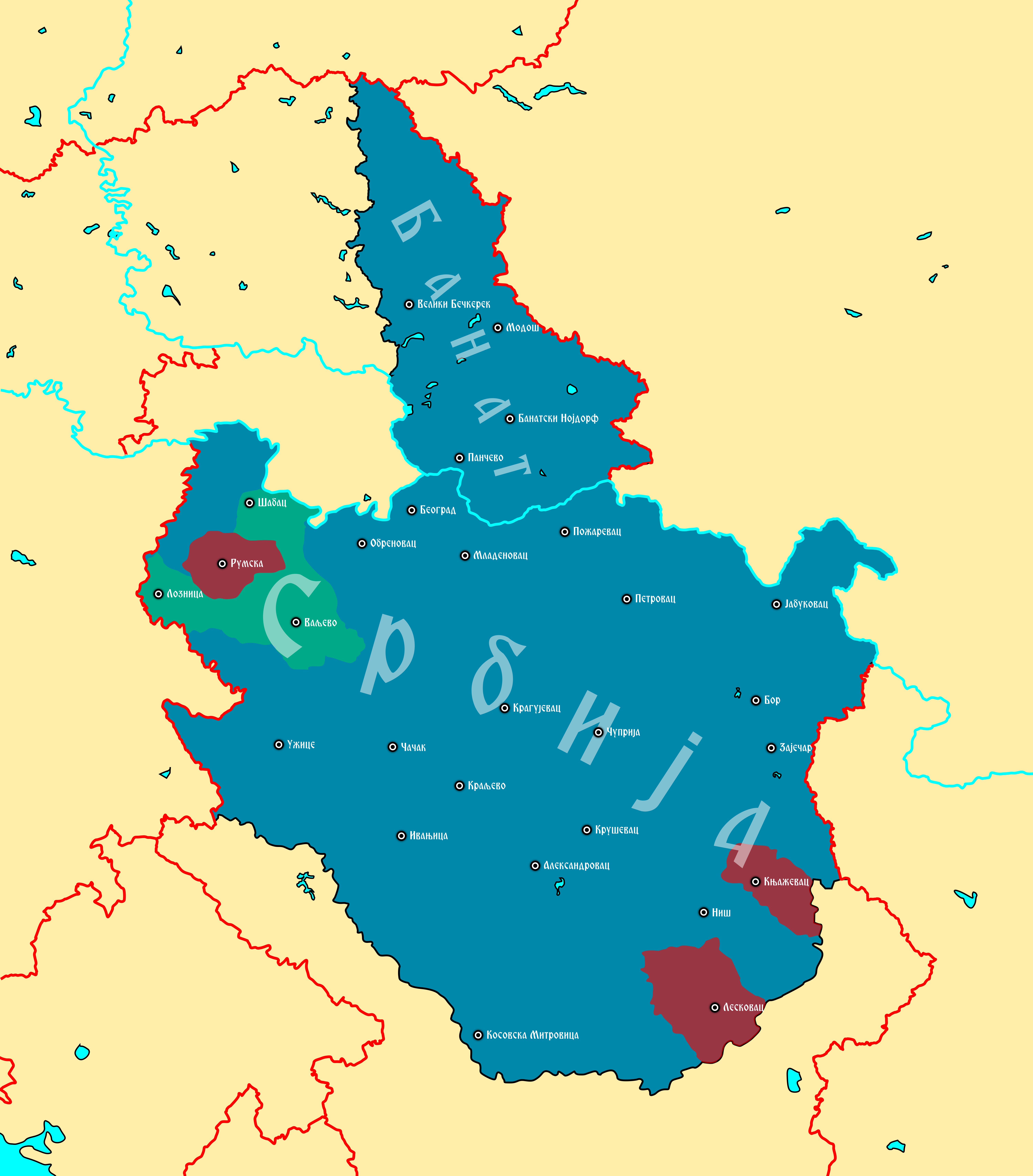 Окупирана Србија [29.08.1941]